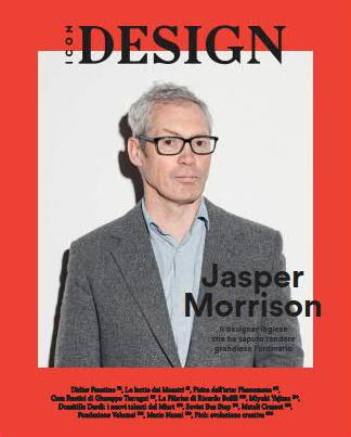 Copertina della rivista Icon Design febbraio 2016, Arnoldo Mondadori Editore.